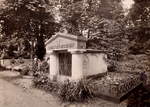 Krystyna z Estreicherów Grzybowska i Karol Estreicher mł. przy grobowców rodzinnym na Cmentarzu Rakowickim w Krakowie, 1910